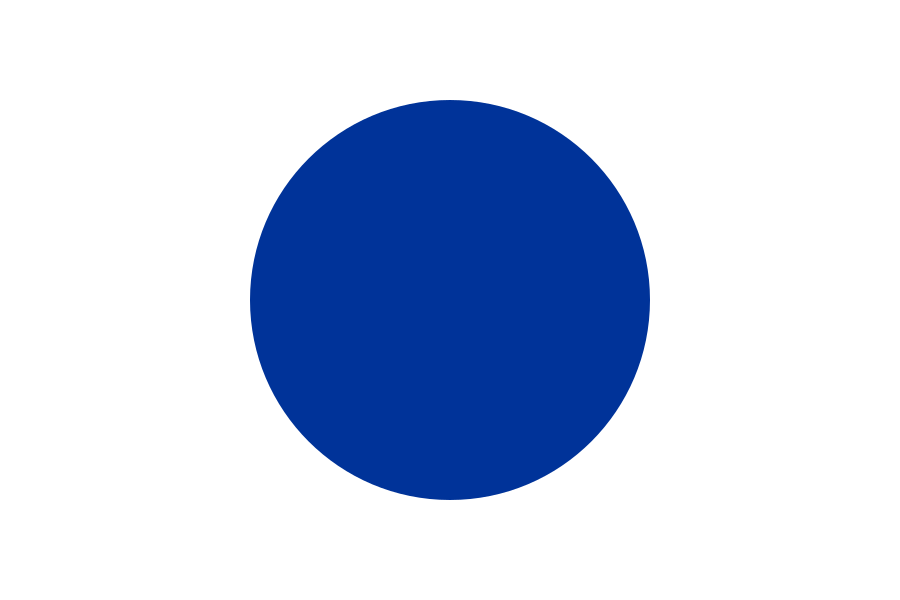 Das Design einer "One World Flag"